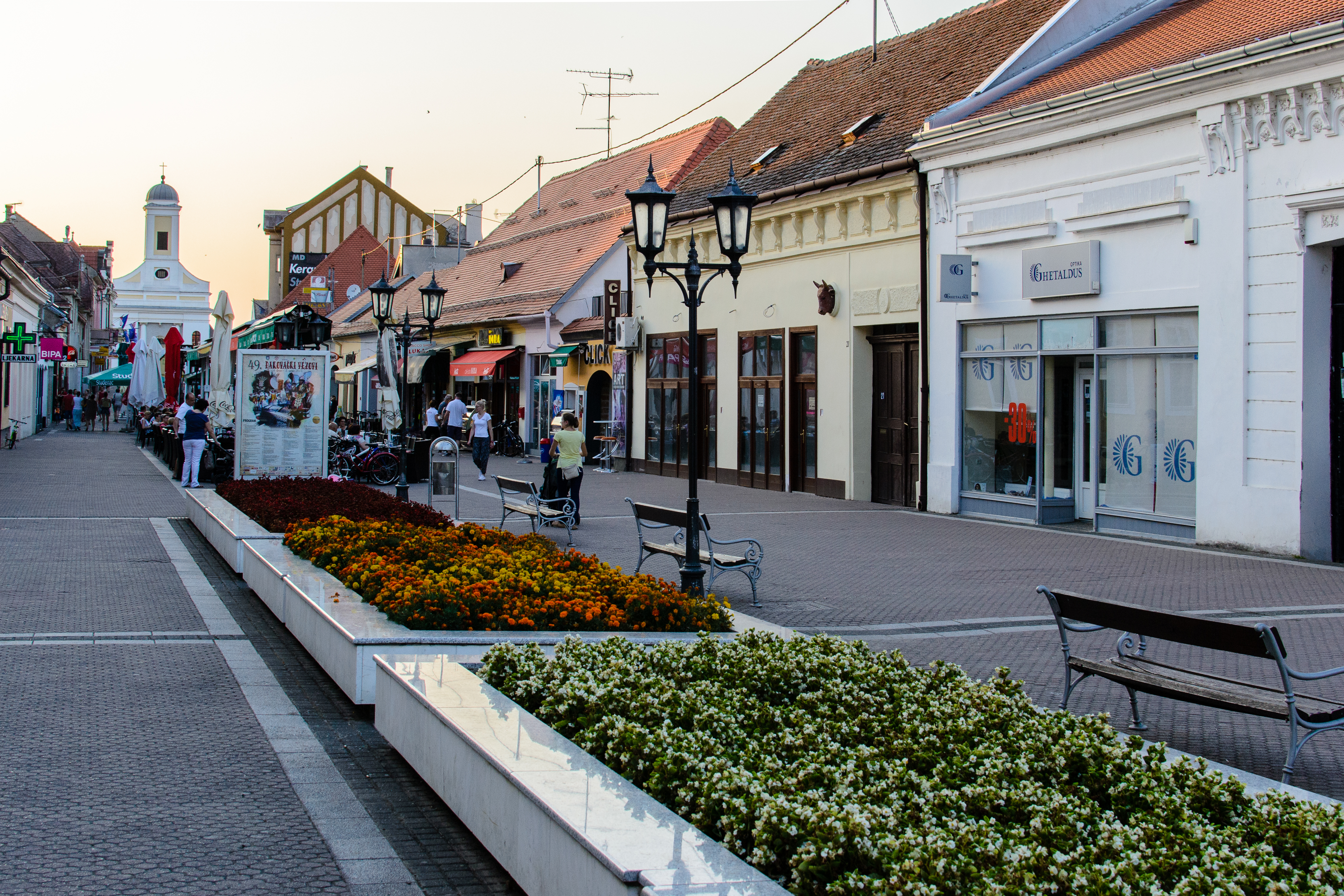 Dakovo